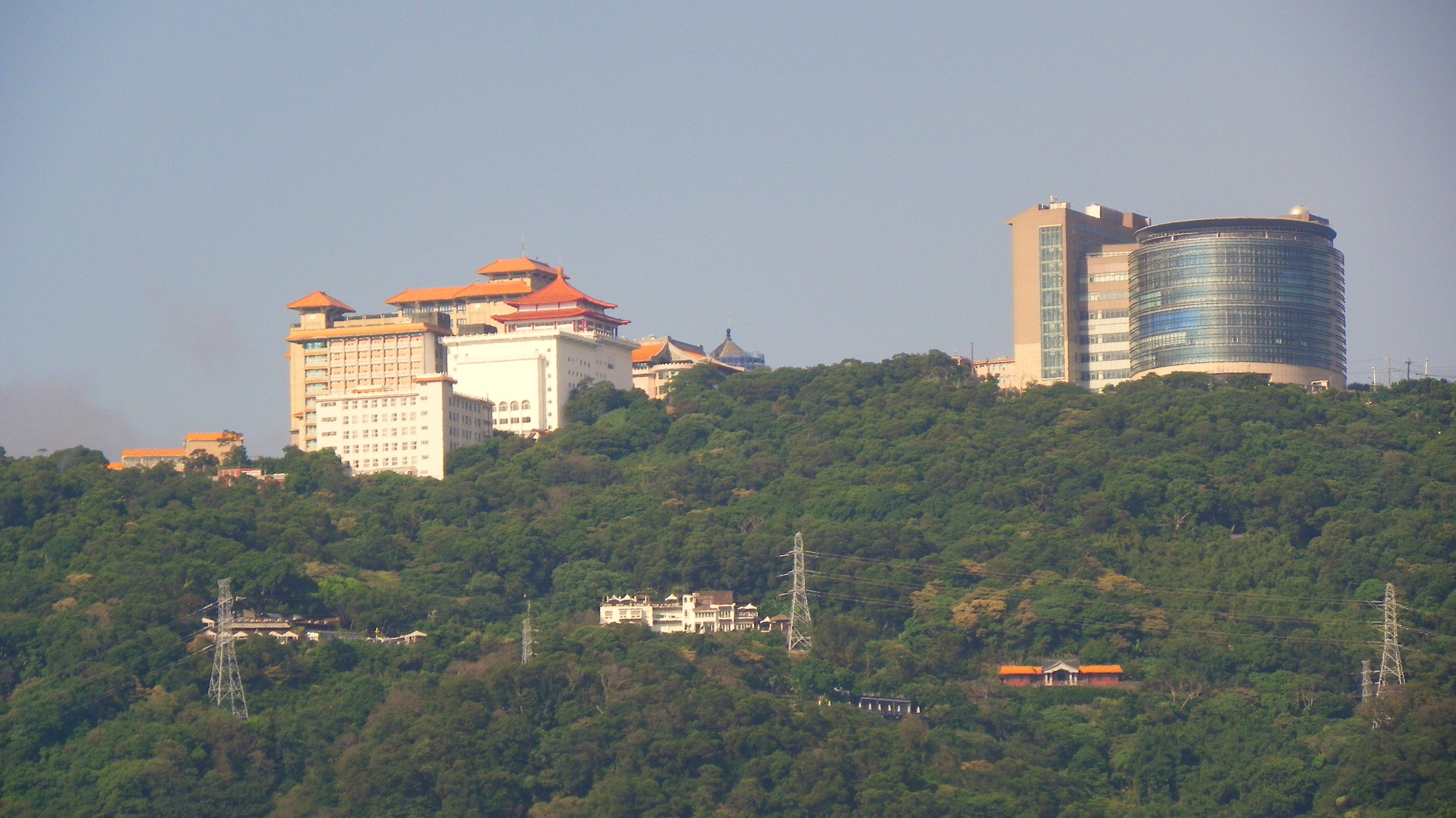 自臺北捷運淡水線石牌站外東北處仰望中國文化大學。